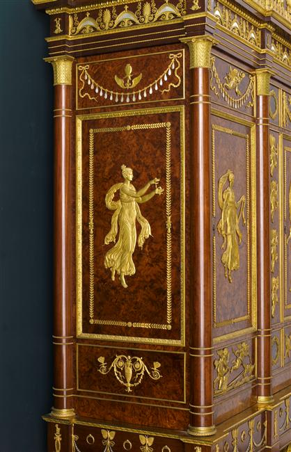 Le grand écrin de Joséphine, livré en 1809 pour la chambre à coucher de l'Impératrice aux Tuileries en 1809. Dessin de Percier, ébénisterie François-Honoré-Georges Jacob Desmalter, bronze Pierre-Philippe Thomire.